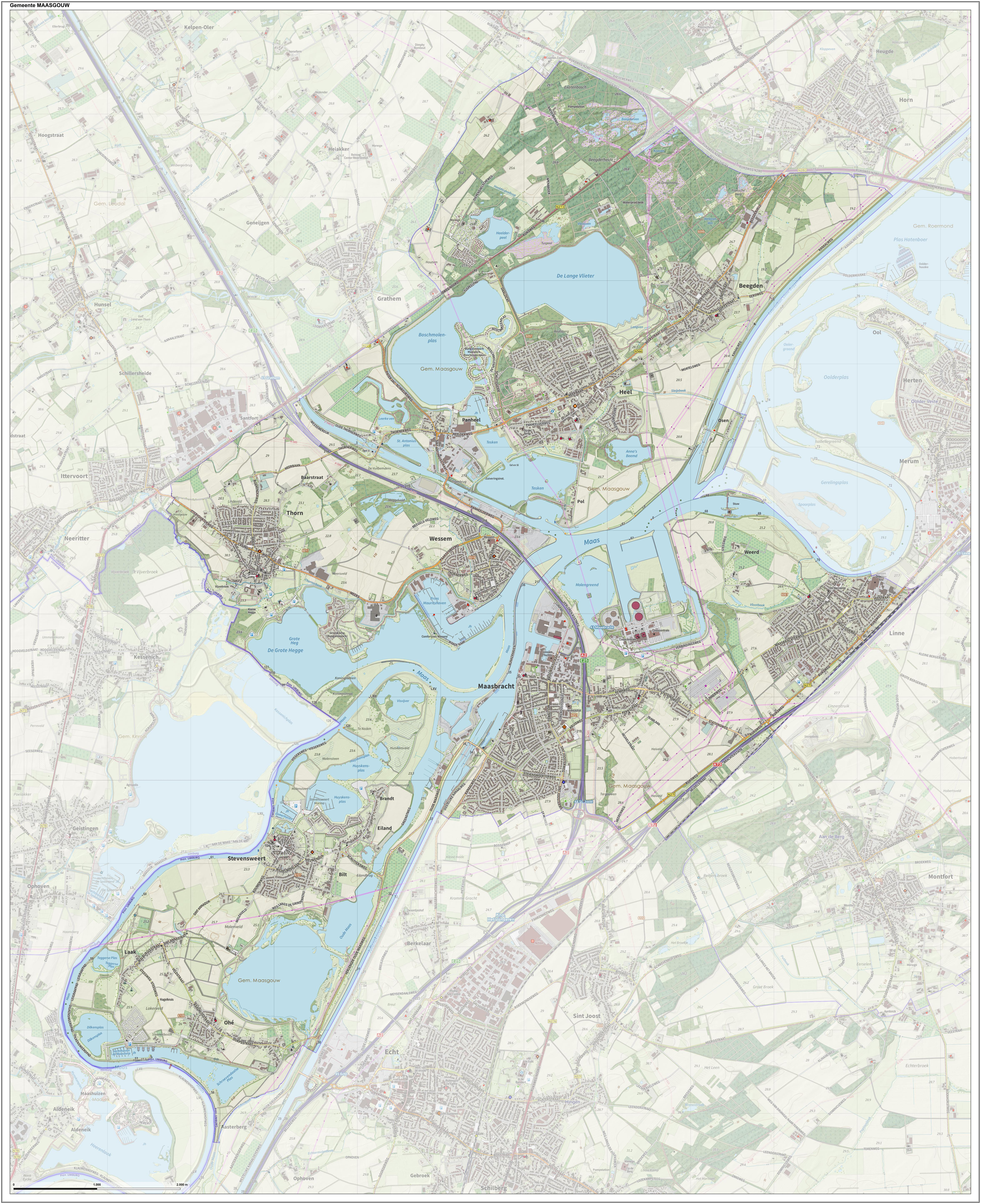 Topografische gemeentekaart. Resolutie: 400 pixels/km. Kaartbeeld samengesteld uit de open geodata van de Top10NL en Top25namen (Kadaster), Creative Commons-BY licentie. Gebouwvlakken uit open geodata BAG extract. Wegen uit de OpenStreetMap, OpenStreetMap community. Reliëfschaduw uit de Actuele Hoogtekaart AHN2. Samenstelling en kleurenschema: Jan-Willem van Aalst, met QGIS. Zie ook de Legenda.